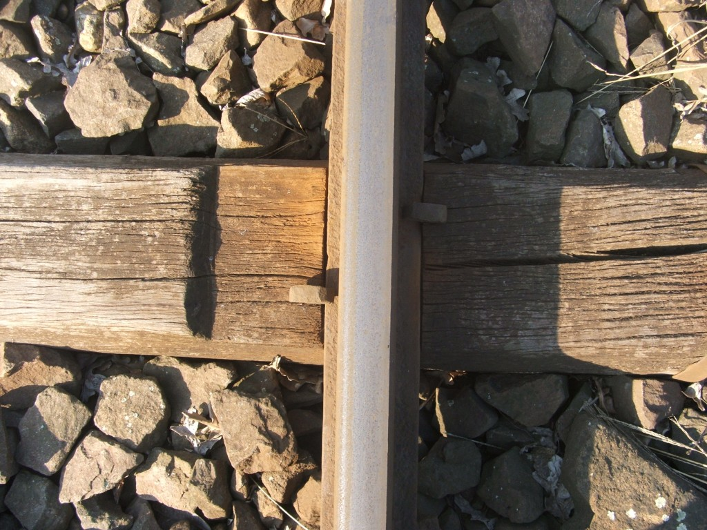 Sínszeges sínleerősítés alátétlemez nélkül (Almáskert mh. közelében)